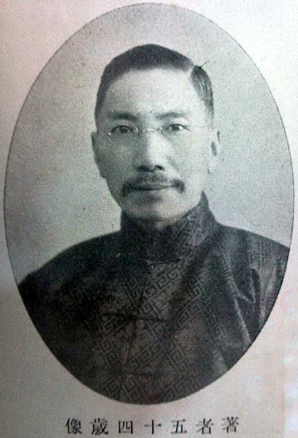 中文（台灣）: 潘敬 進士